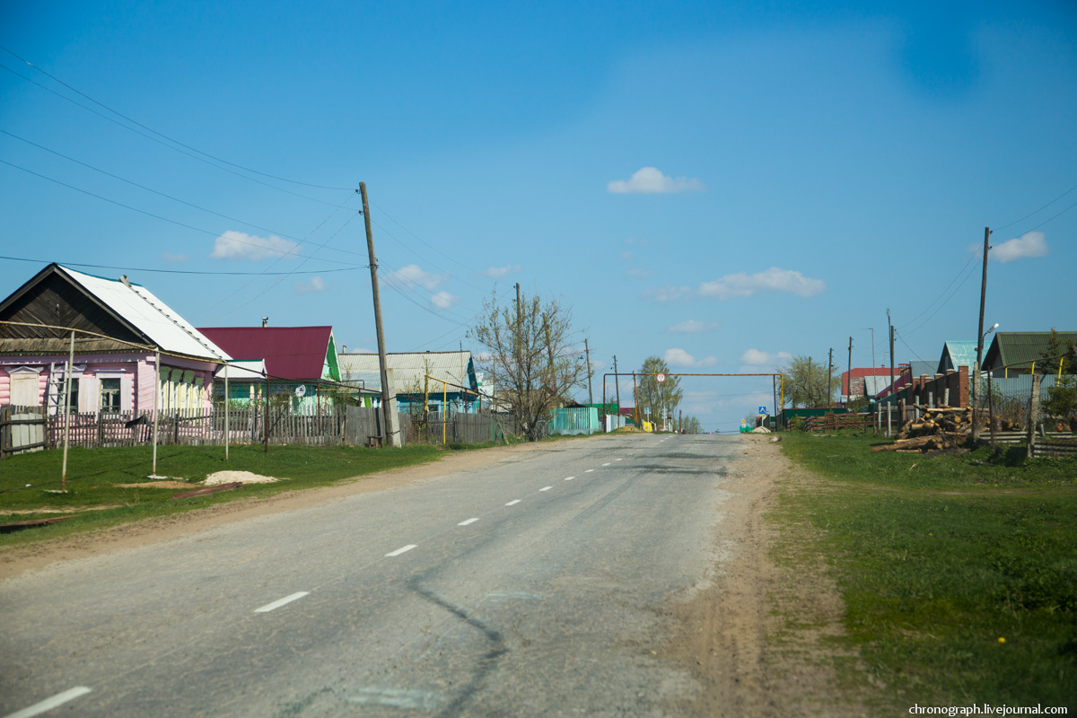 Дома на ул. Советской, Старая Бинарадка, Самарская область, Россия